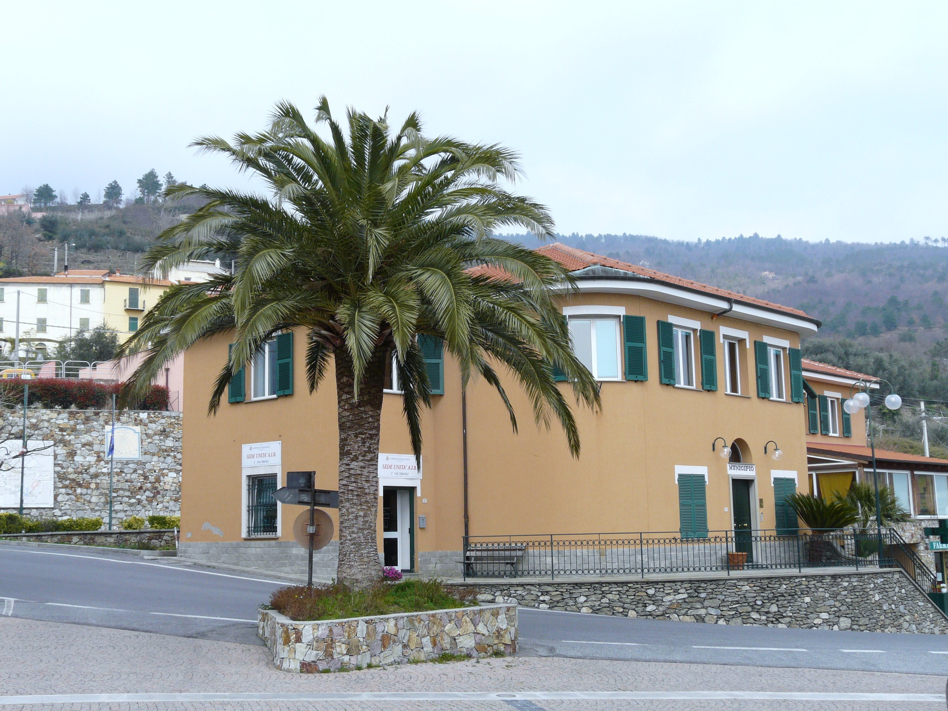 Municipio, Magliolo, Liguria, Italia